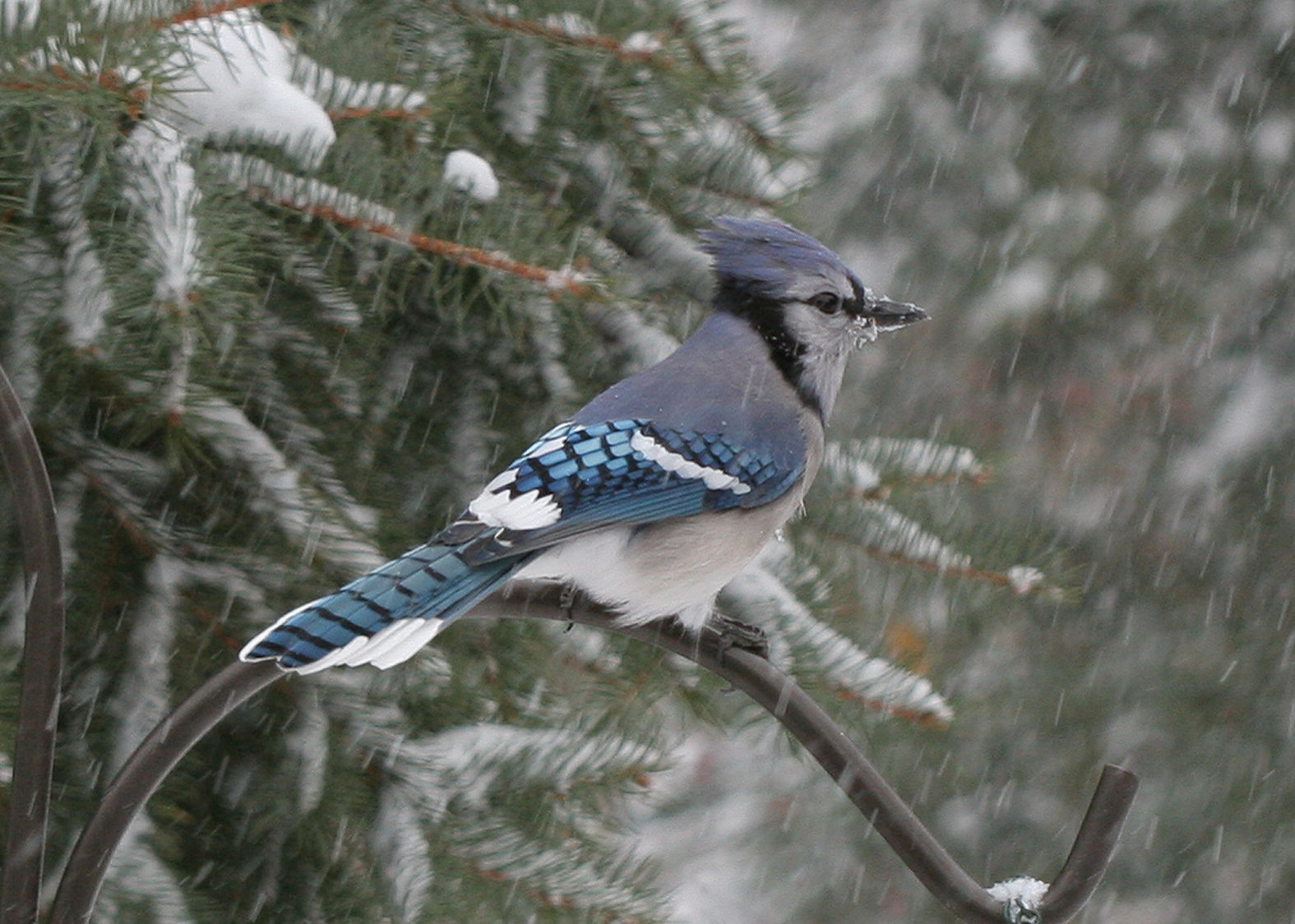 Explore Dec. 8, 2008